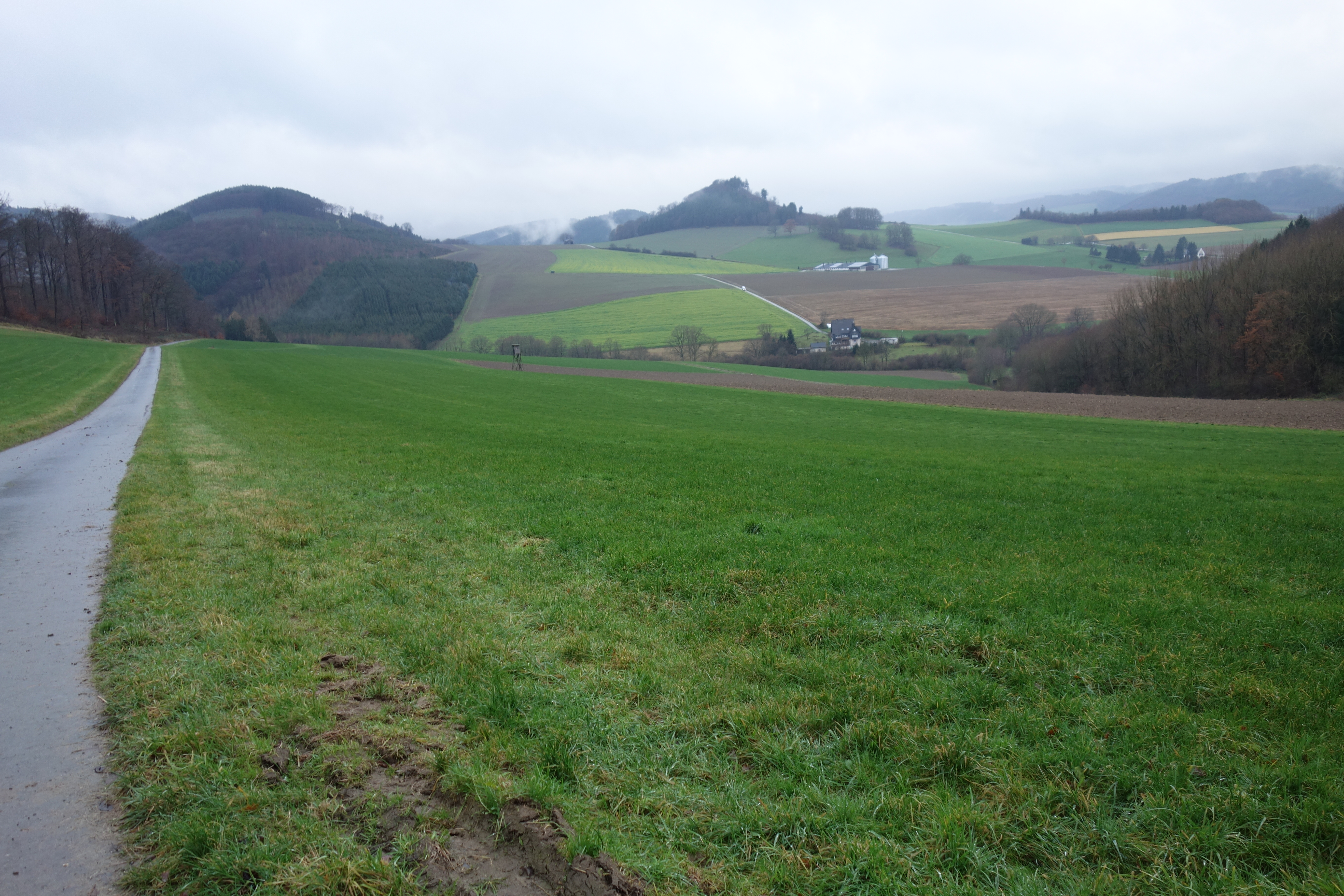 Offenland gehört zum Landschaftsschutzgebiet Ortsnahe Freiflächen bei Wallen und Wald zu Landschaftsschutzgebiet Meschede. Blick vom Naturschutzgebiet Bocksbart nach Westen.